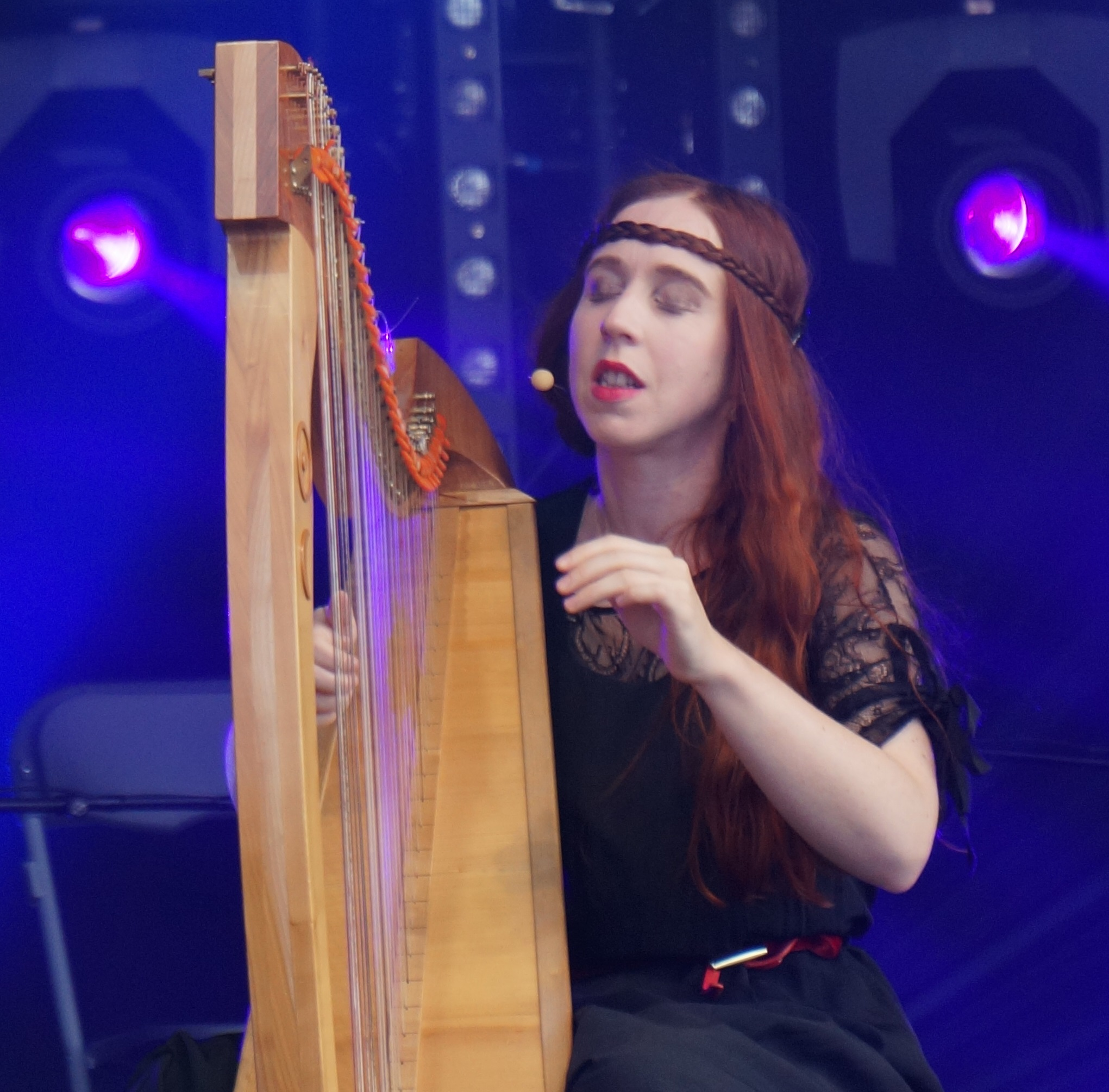 lors de la Foire de Châlons-en-Champagne 2014.